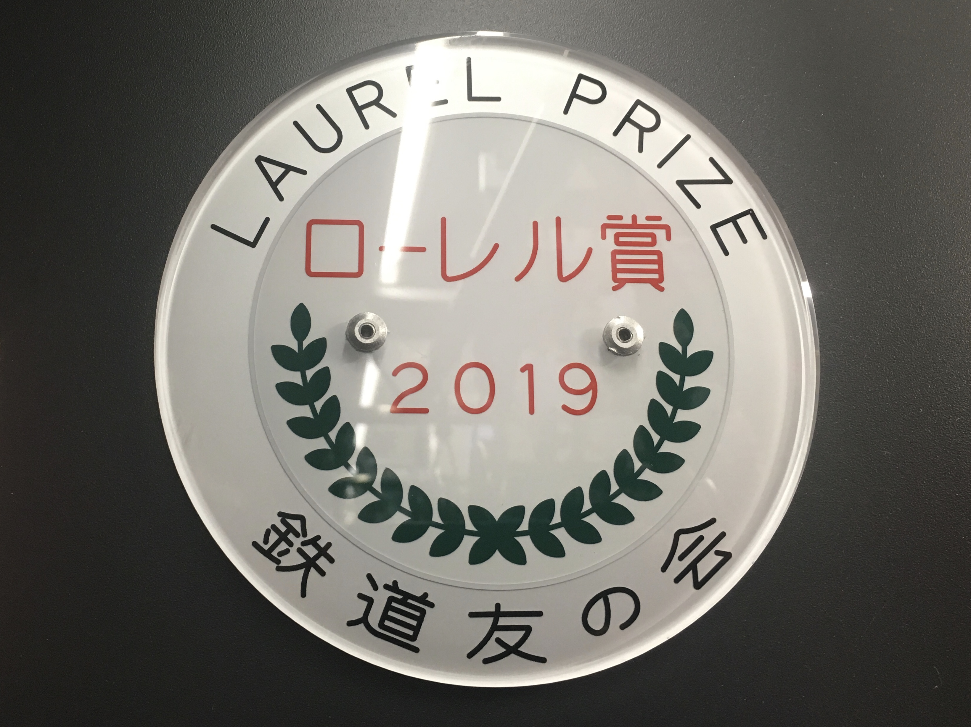 相鉄20000系の第一編成（20101F）に設置されている鉄道友の会「ローレル賞」プレート（2019年受賞）。